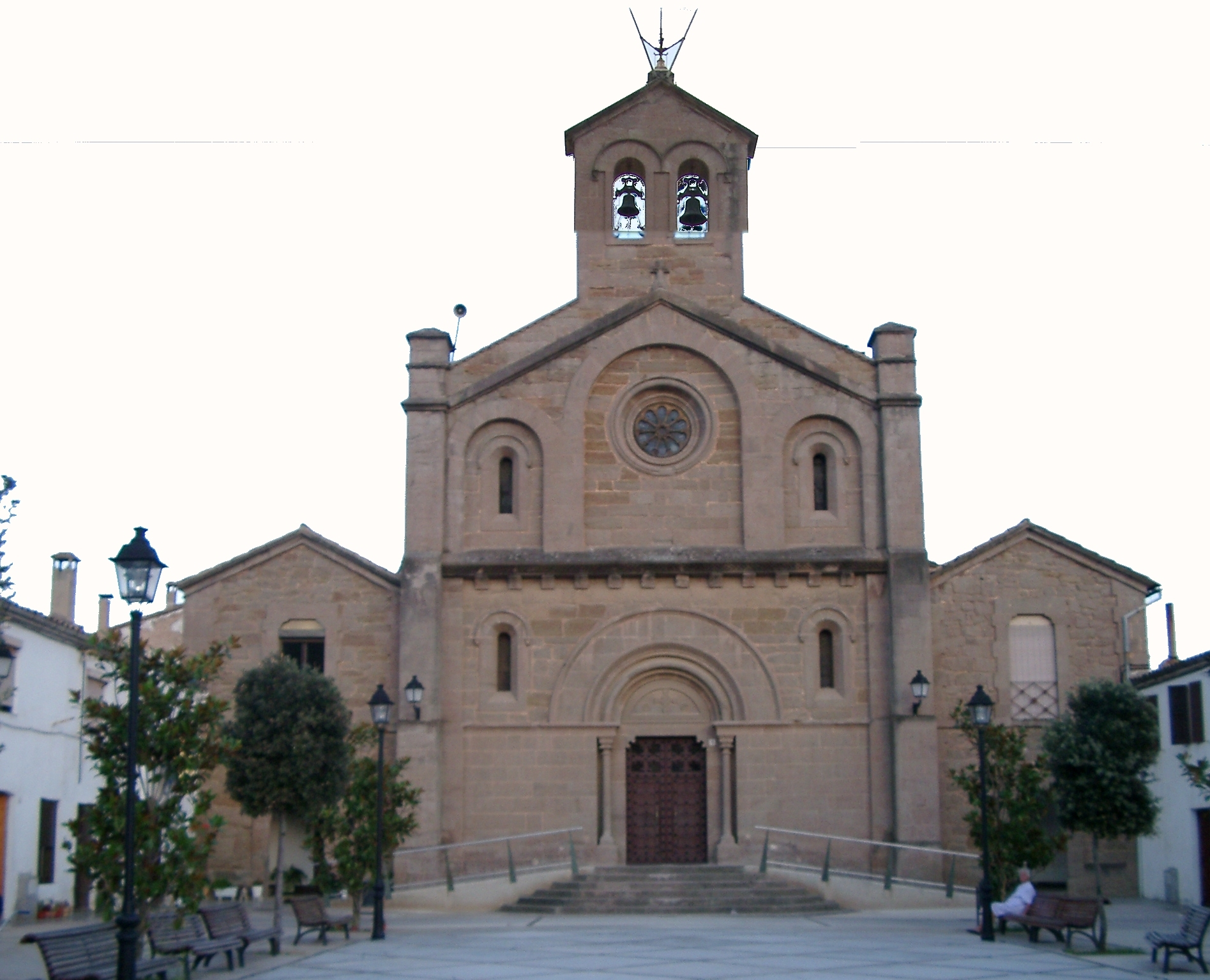 Ametlla de Merola Plaça de l'esglèsia